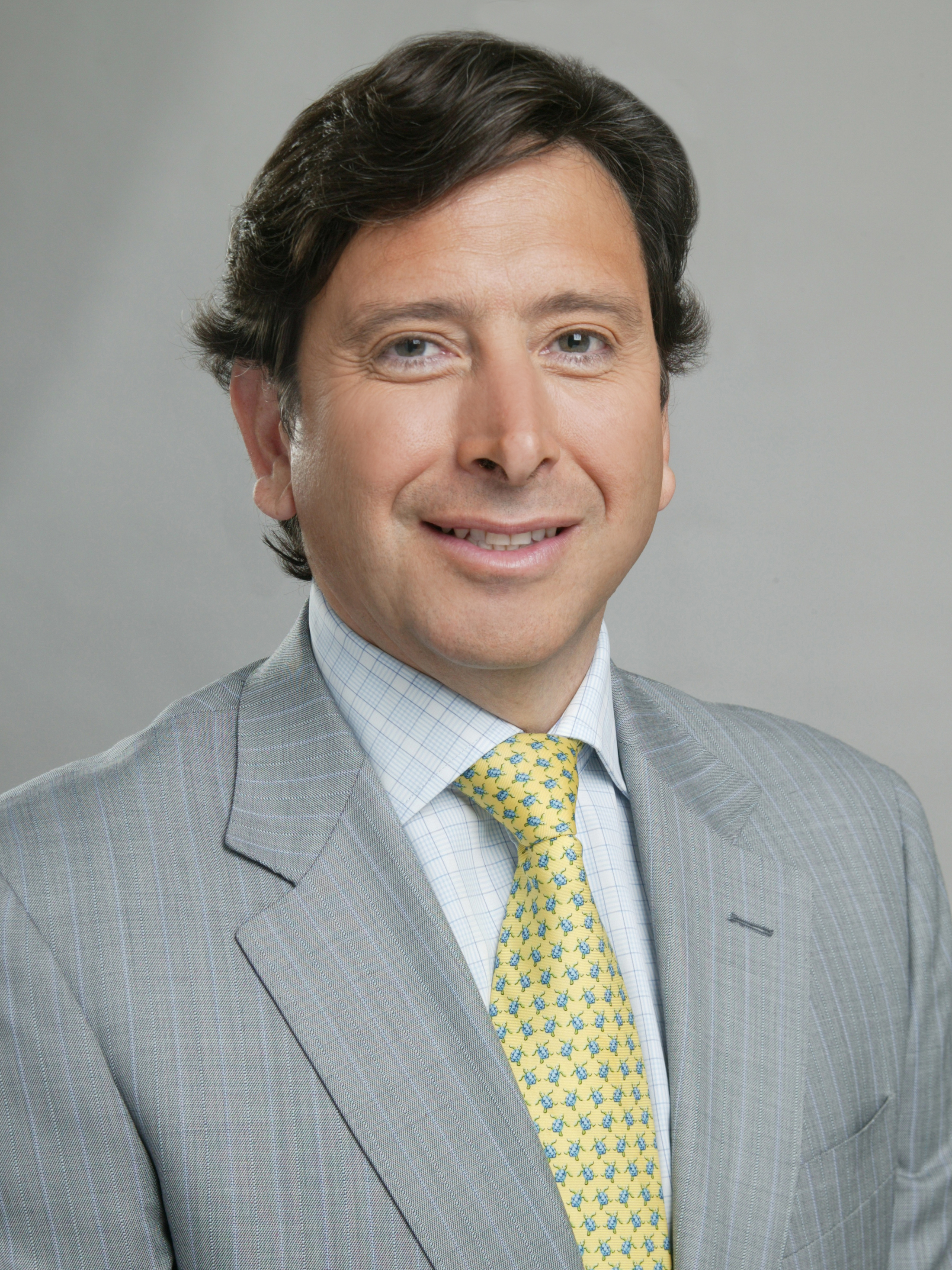 Laurence Golborne, ingeniero chileno.